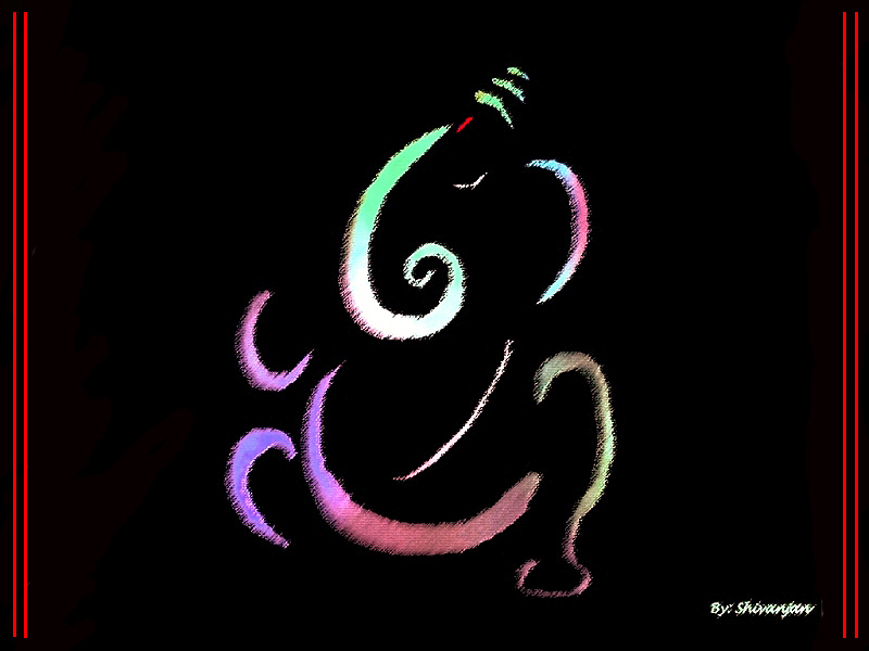 Ganesha_digital art